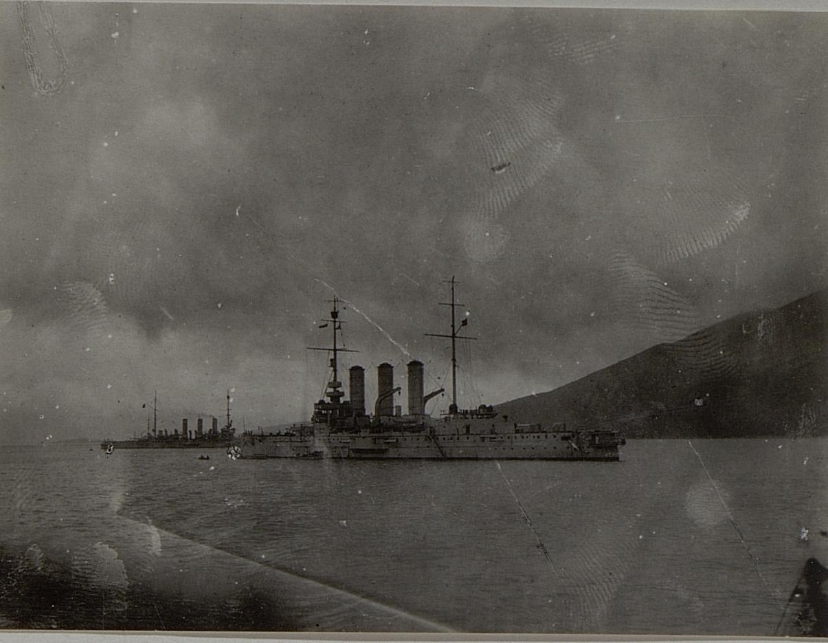 Kriegsalbum 26, Bild 7159